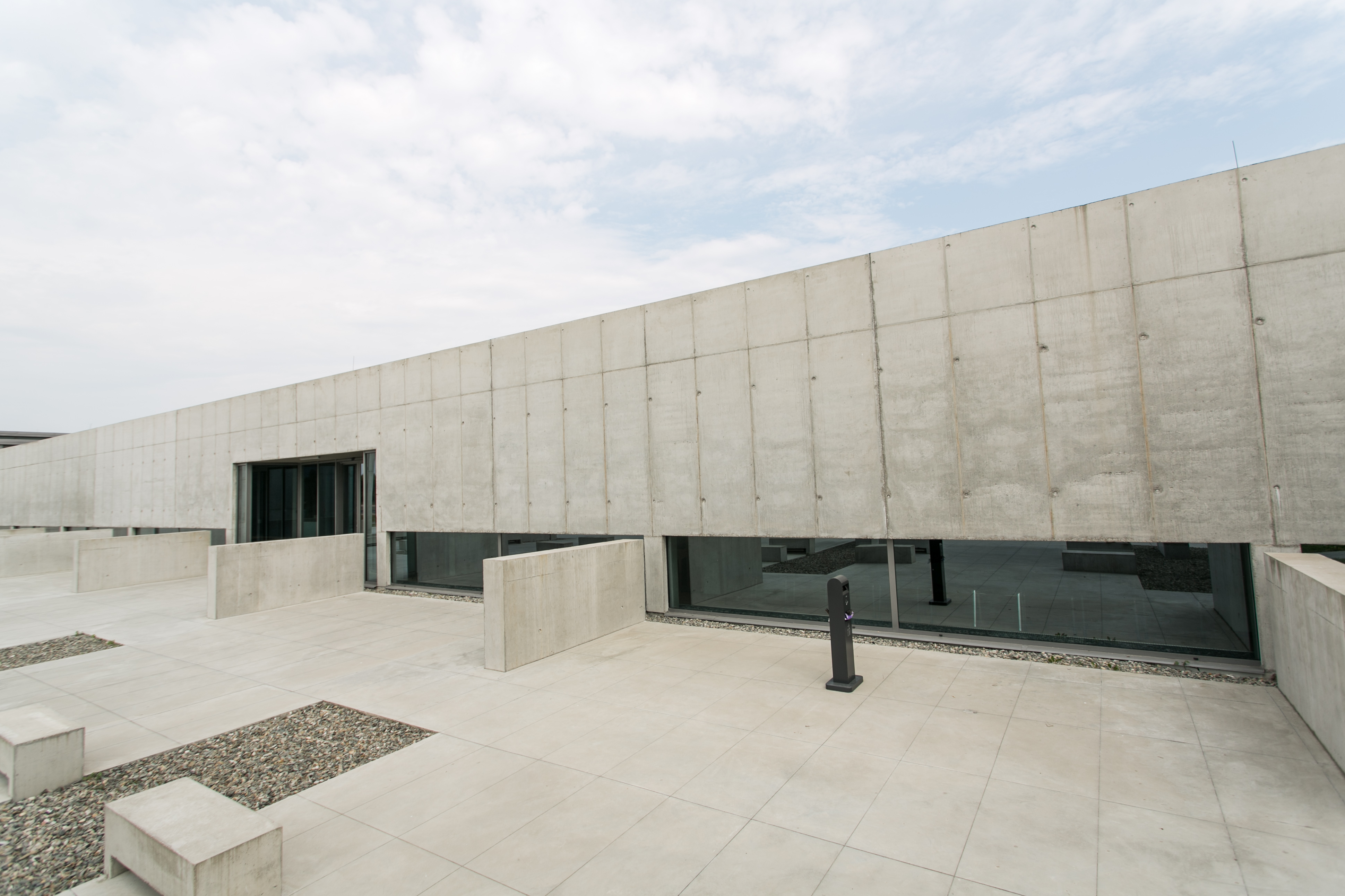 Lubelski Park Naukowo-Technologiczny z siedzibą przy ul. Bohdana Dobrzańskiego 3 w Lublinie